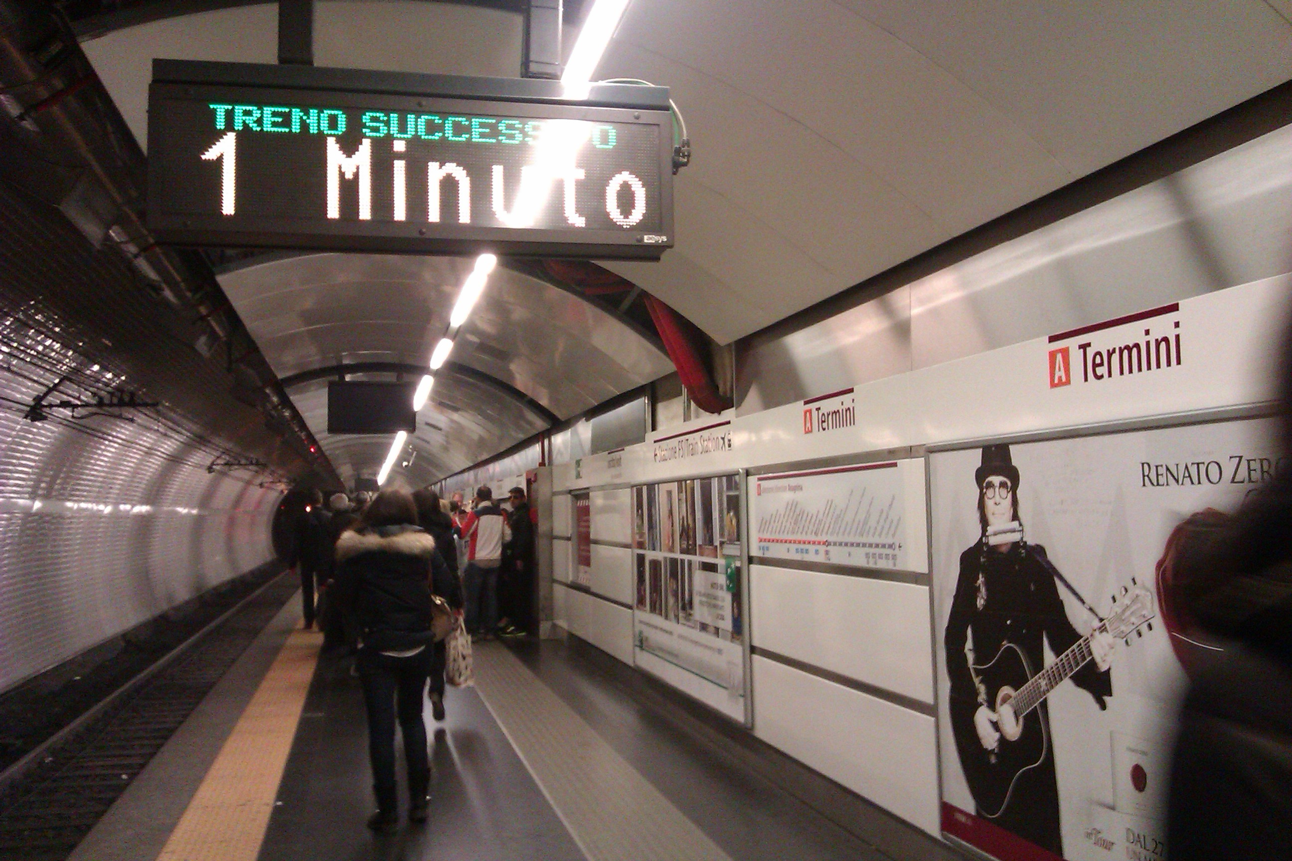 La banchina della linea A alla stazione Termini, direzione Anagnina, a lavori di ristrutturazione quasi ultimati